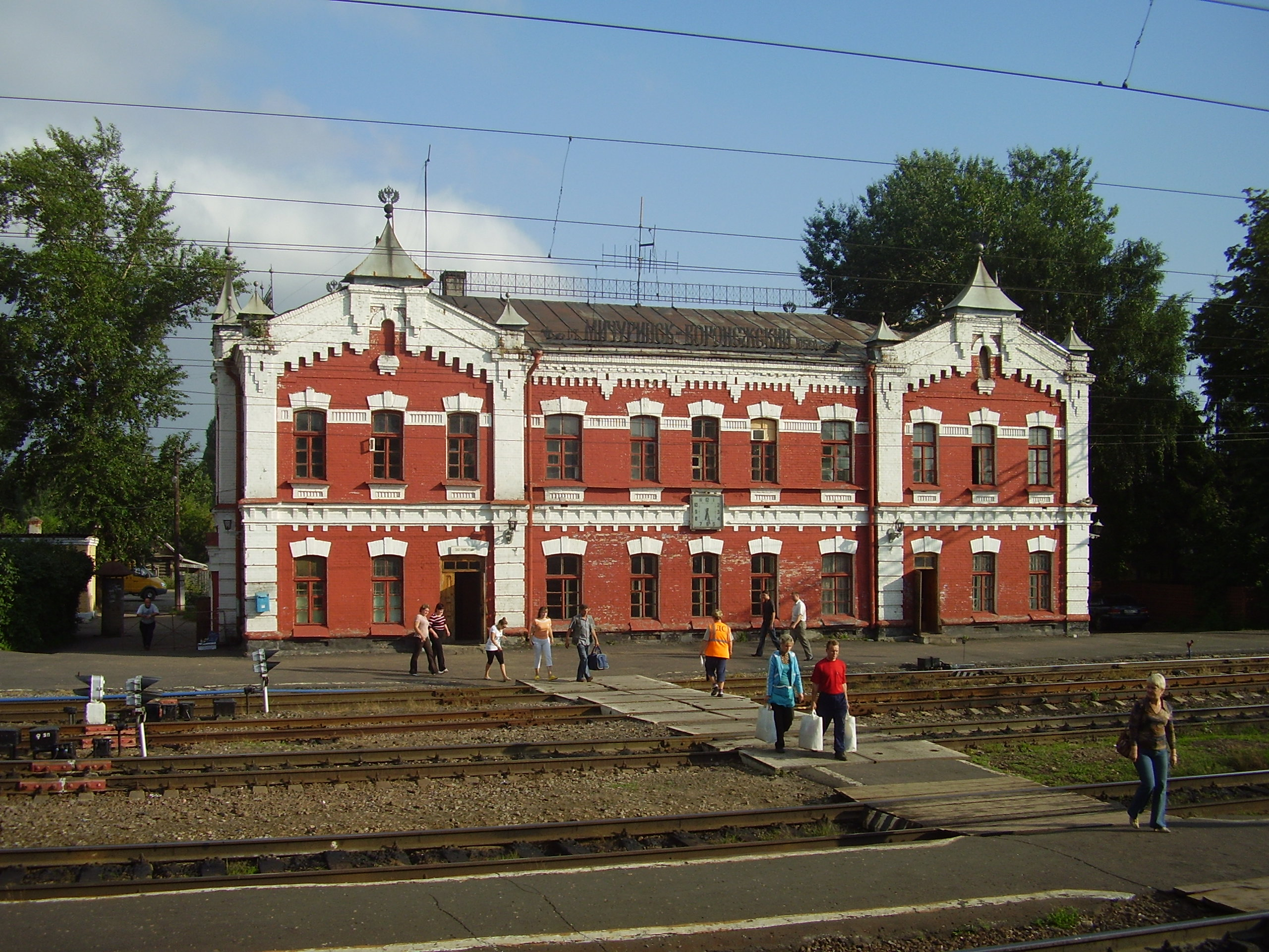 Вокзал "Мичуринск-Воронежский"